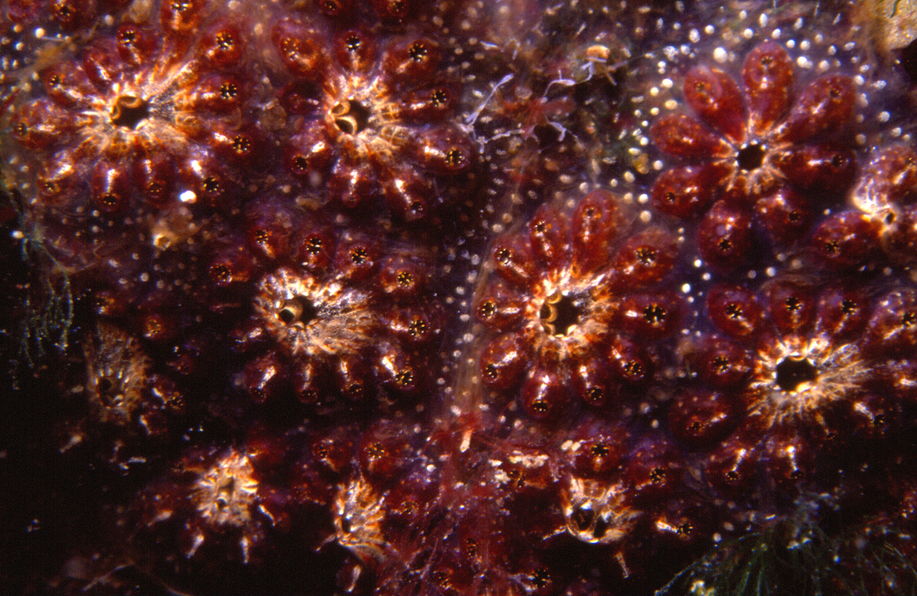 Botryllus schlosseri (Pallas, 1766) - Banyuls-sur-Mer : 07/91